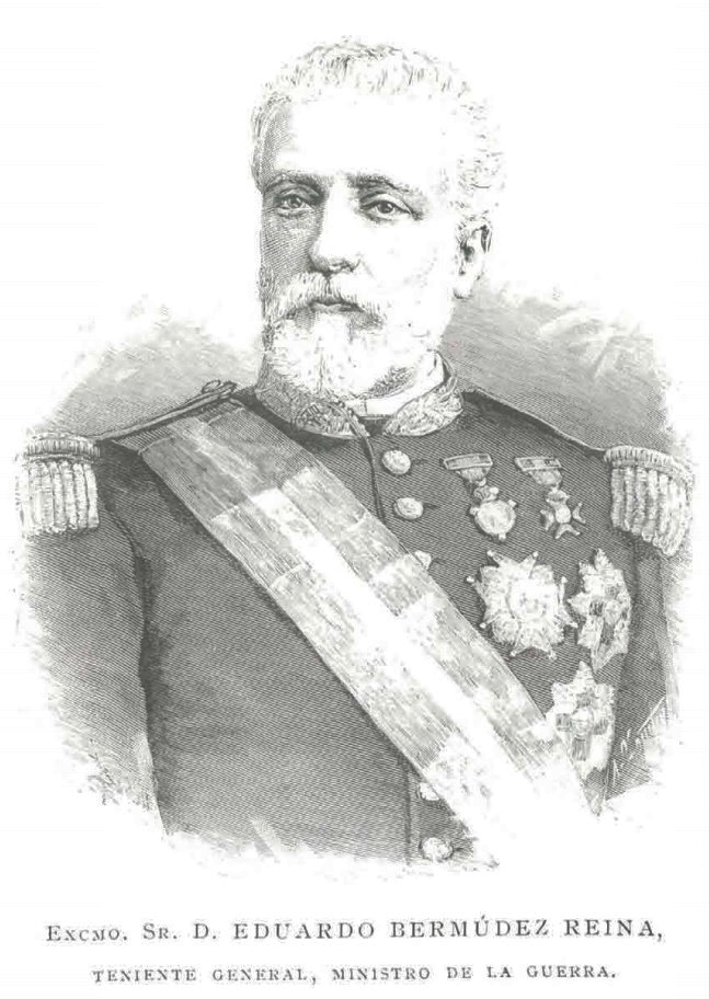 Eduardo Bermúdez Reina. Teniente General, Ministro de la Guerra.